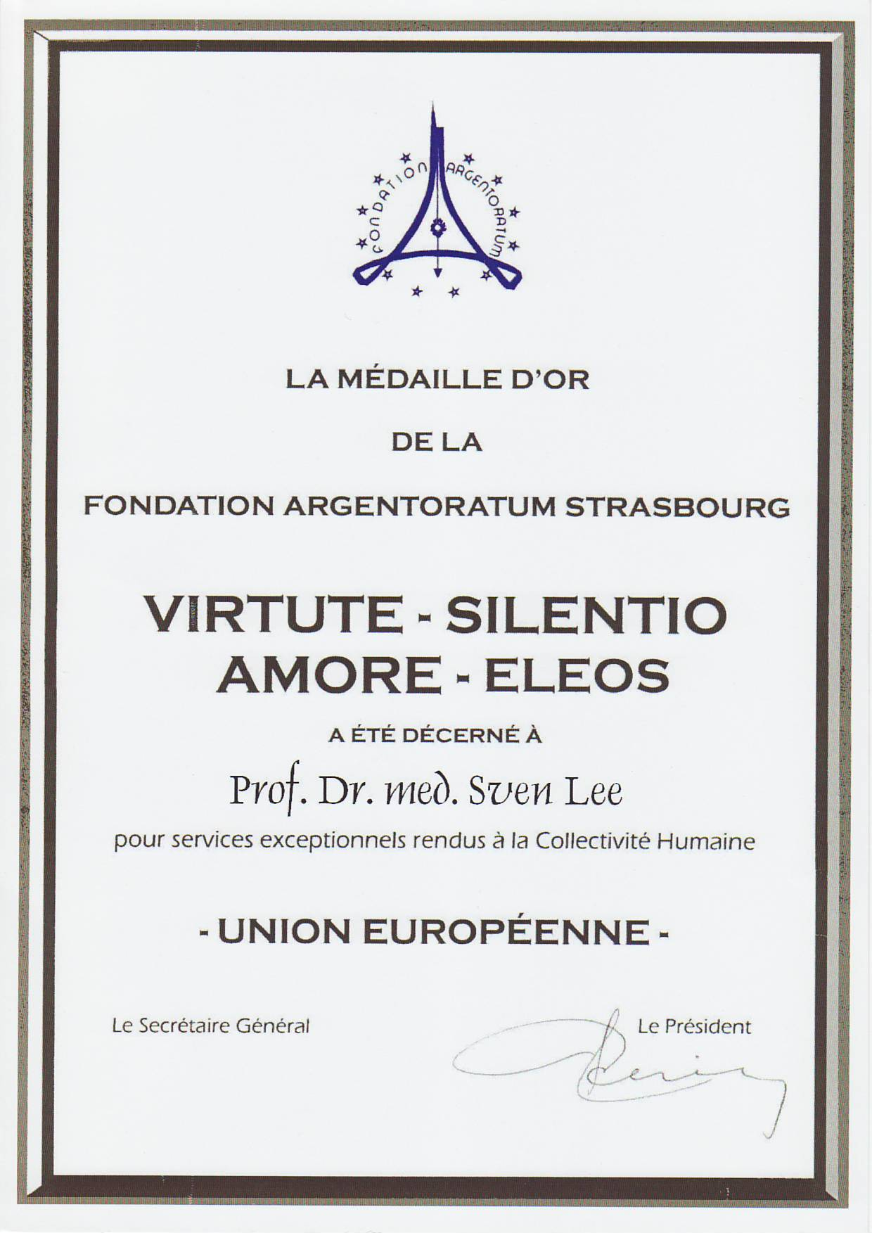 스벤 리 박사의 유럽연합 은빛 훈장